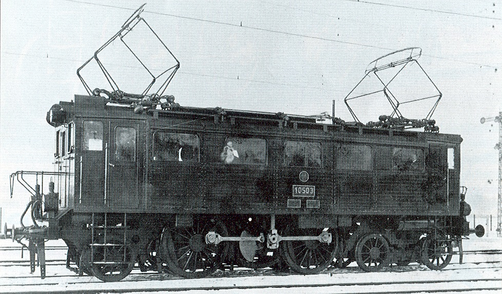 Werkfoto der BEW über die ES 3